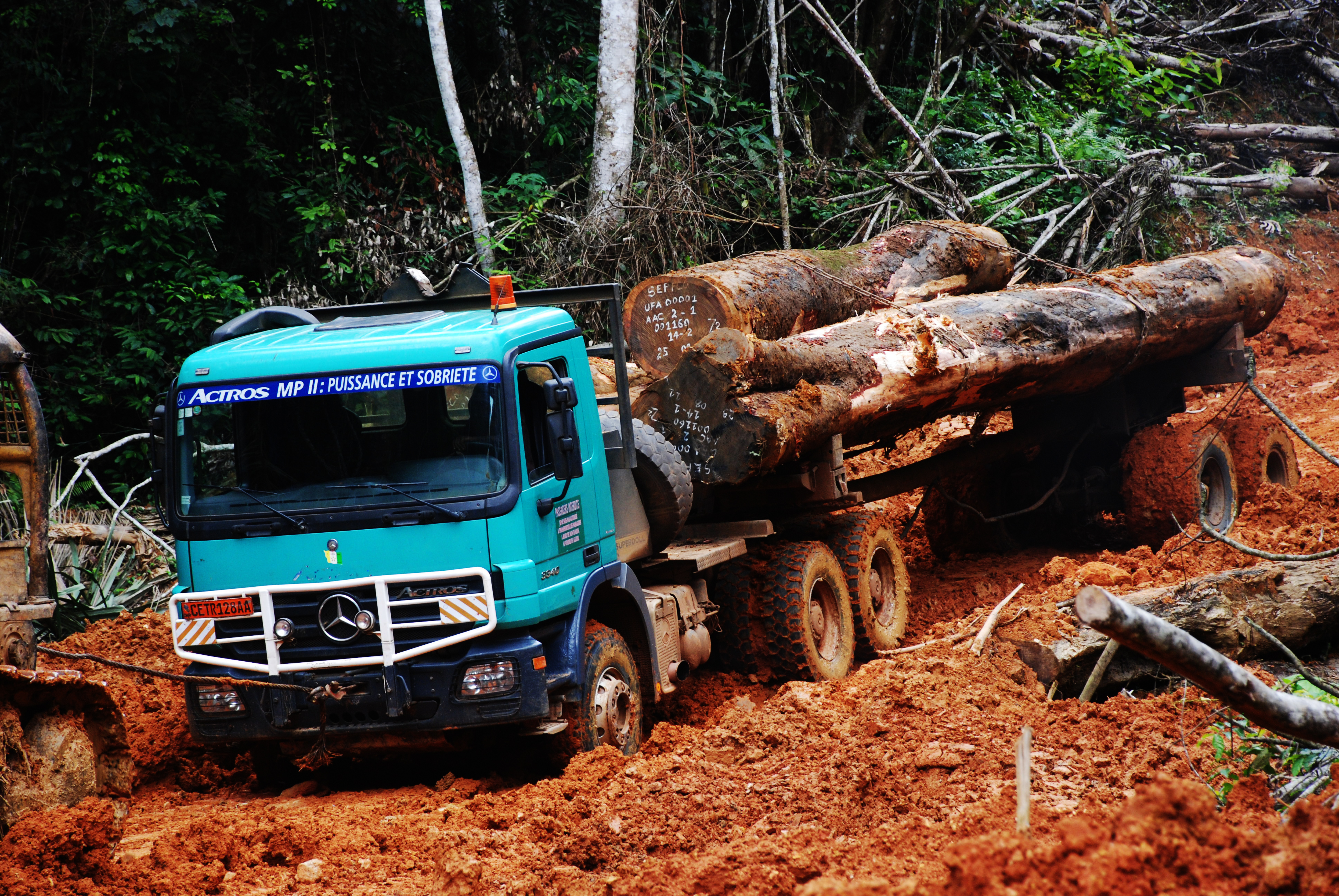 Grumier embourbée dans la forêt d'Eseka dans le Littoral pendant la saison des pluies This is an image with the theme "Africa on the Move or Transport" from: Cameroon